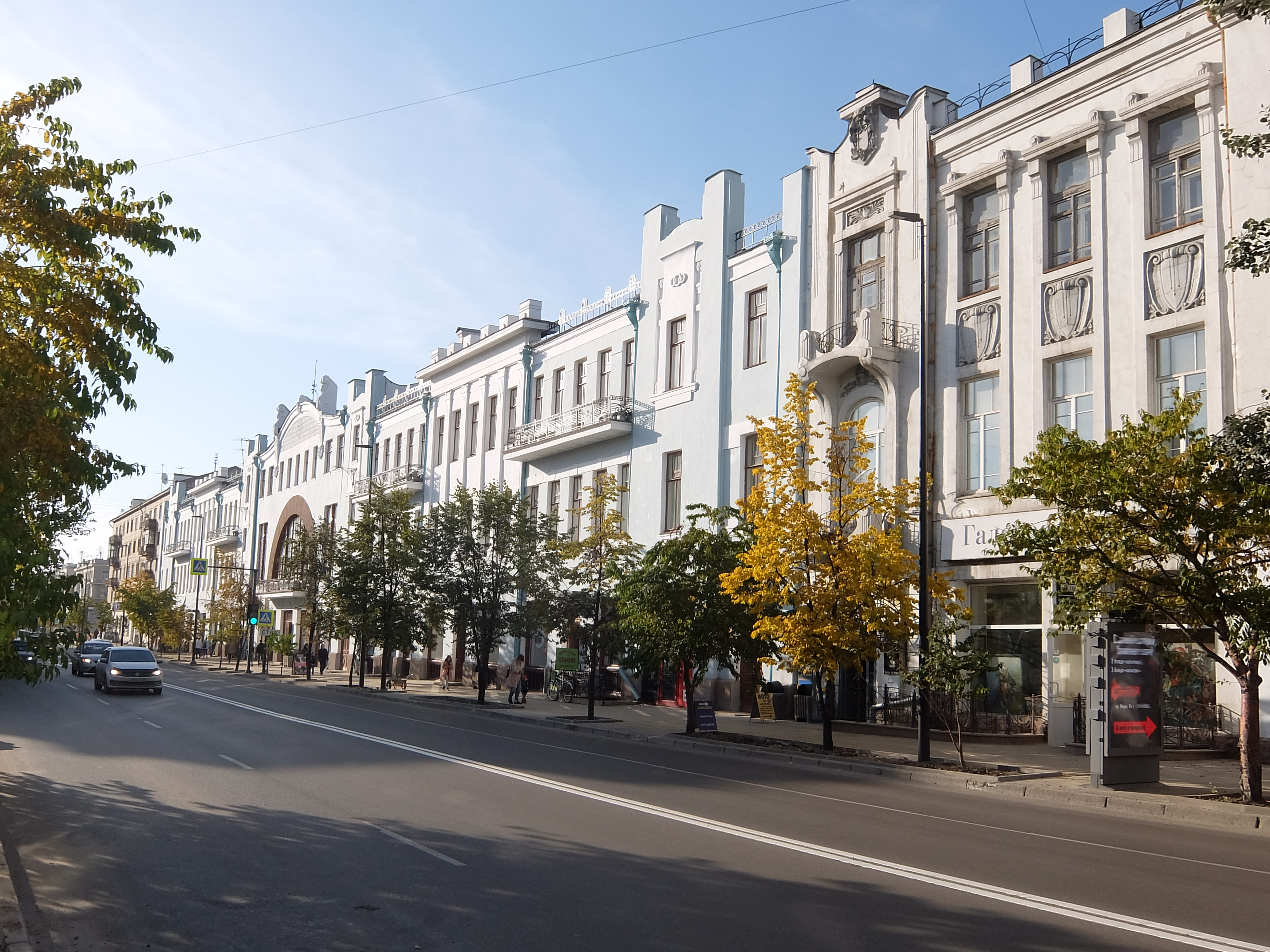 Доходные дома начала XX века на проспекте Мира.